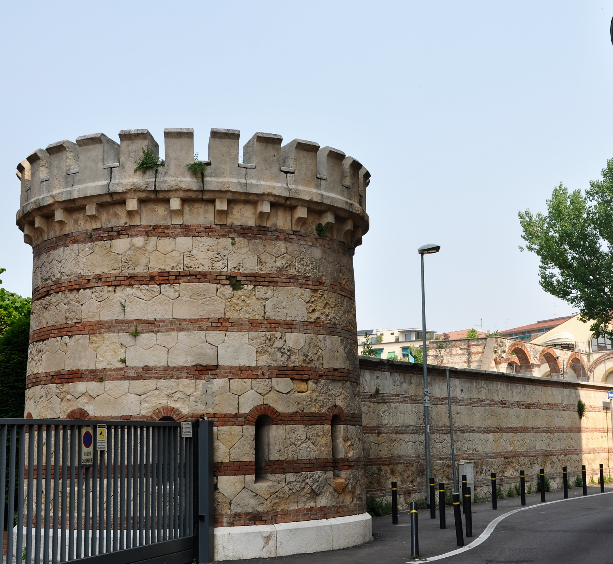 Arsenale Franz Josef I, particolare di una delle 4 torrette di guardia. This is a photo of a monument which is part of cultural heritage of Italy.